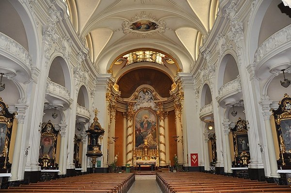 Die Kollegiumskirche Maria Hilf in Schwyz